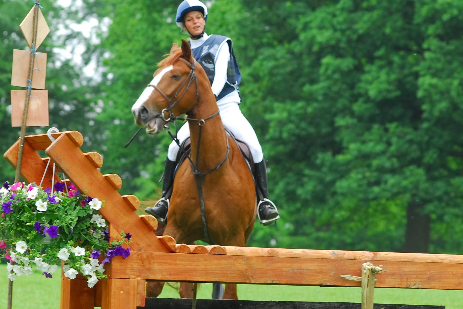 Un refus coute 20 points.